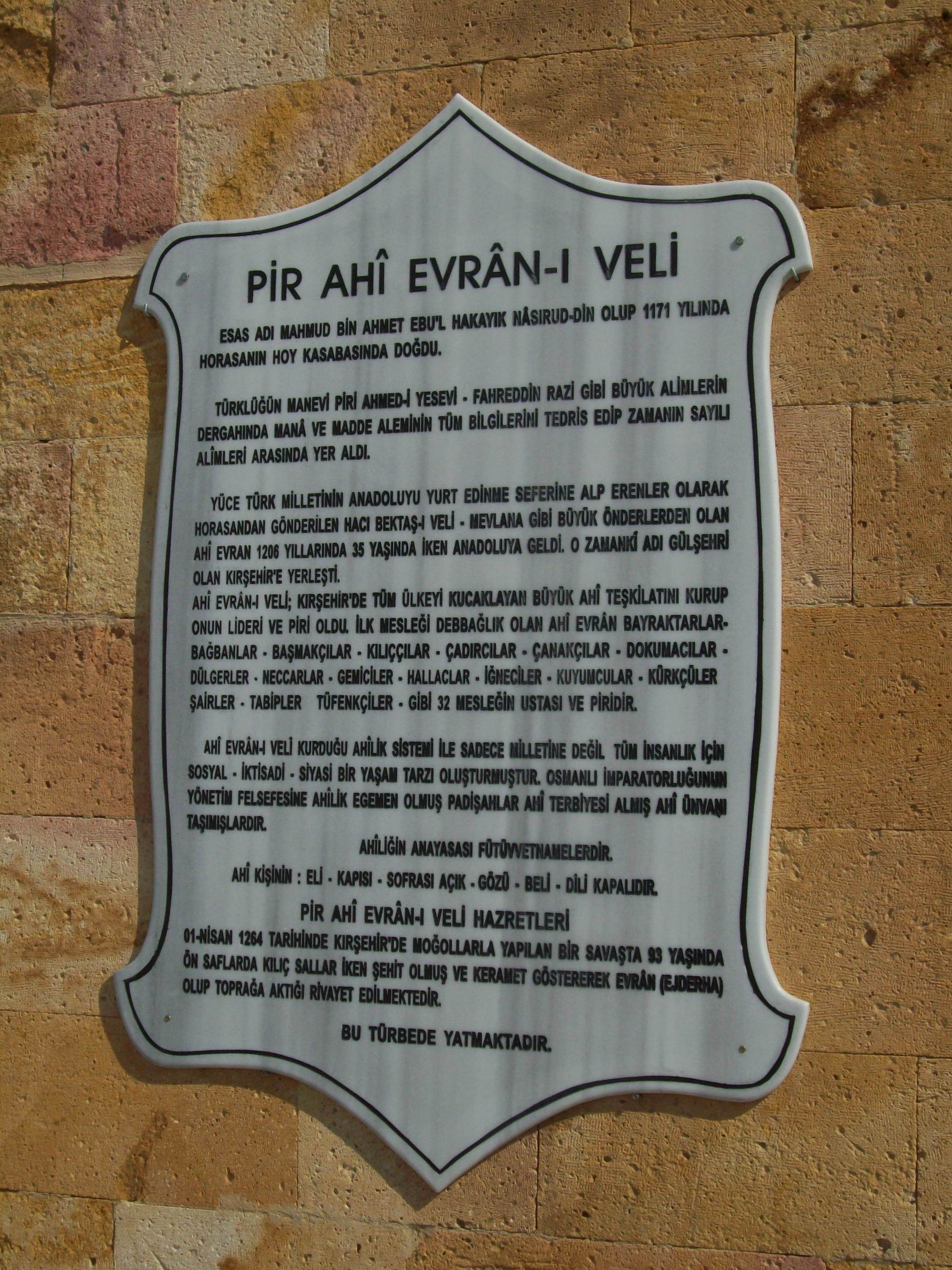 Ahi Evran Türbesi Bilgi Levhası